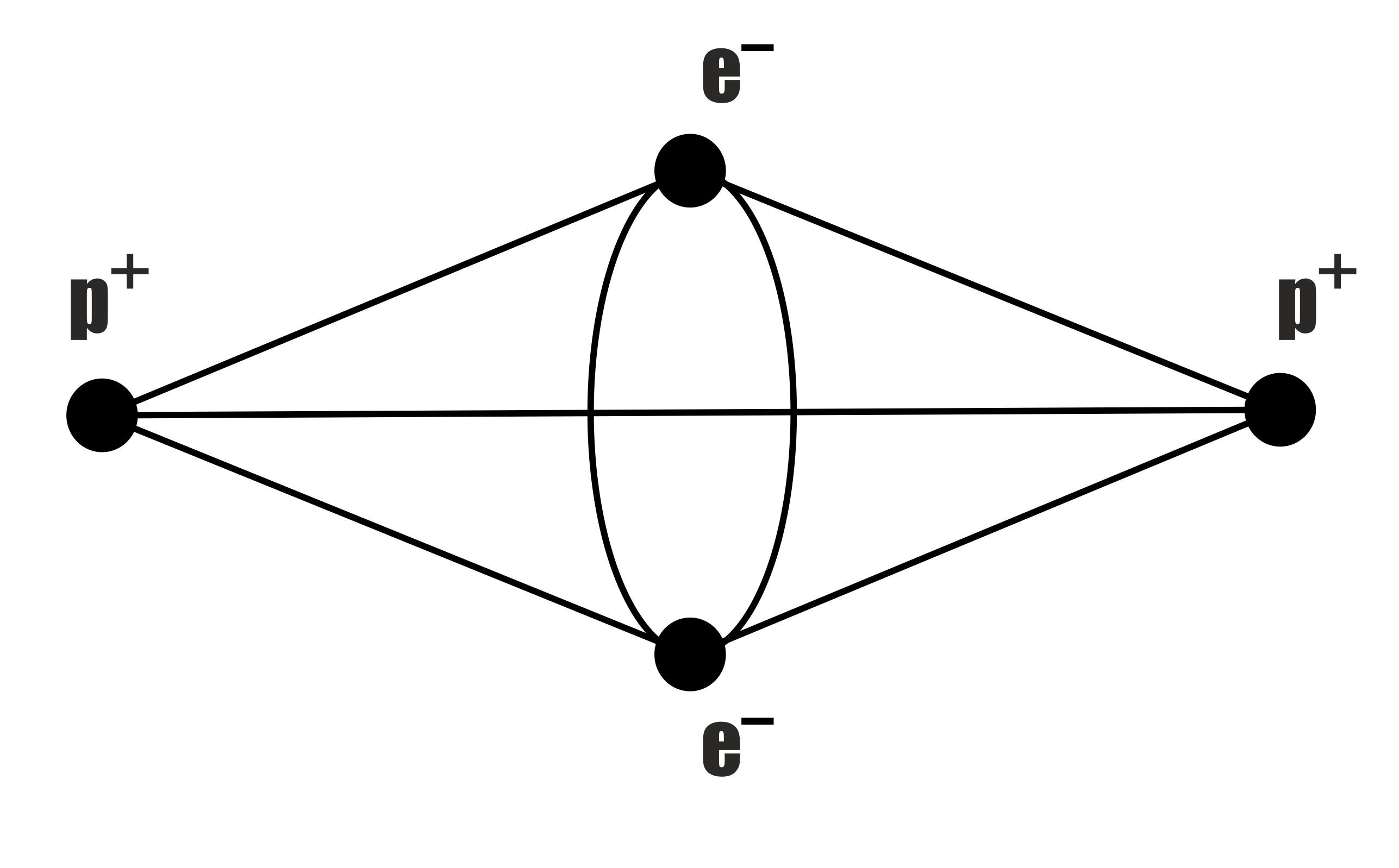 Строение молекулы H2 по Бору